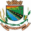 Brasão de Alvorada do Norte, Goiás, Brasil.